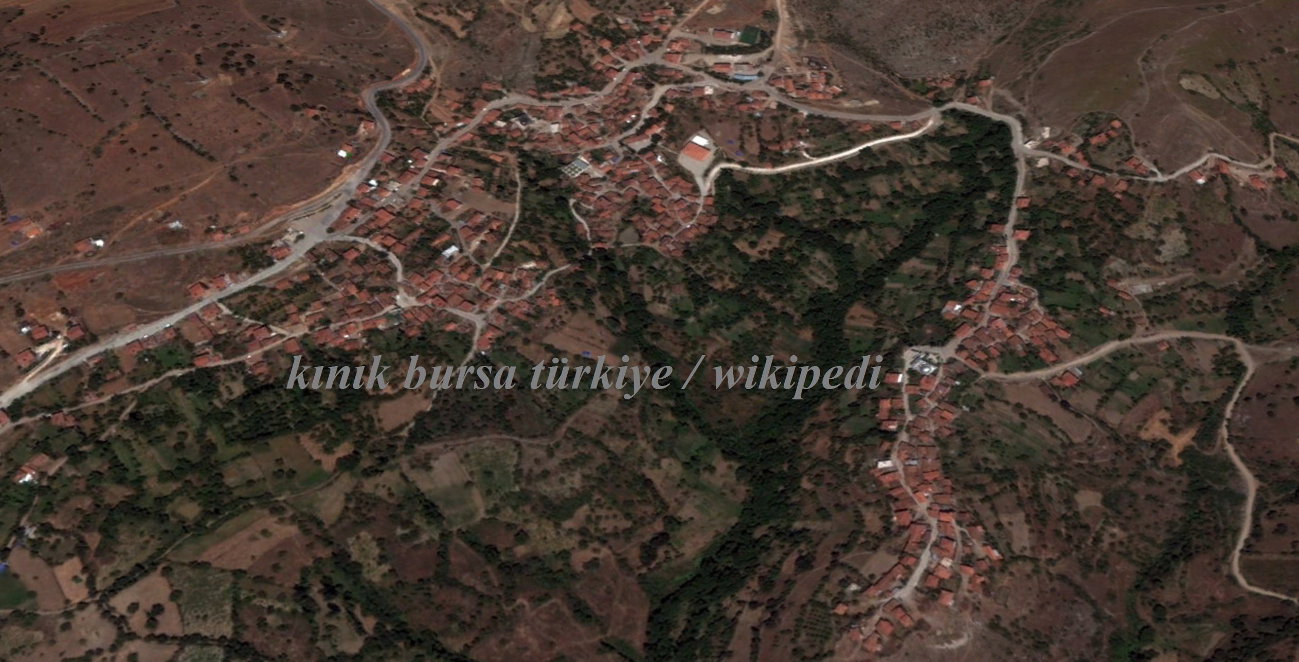 kınık bursa türkiye üsten görünüm